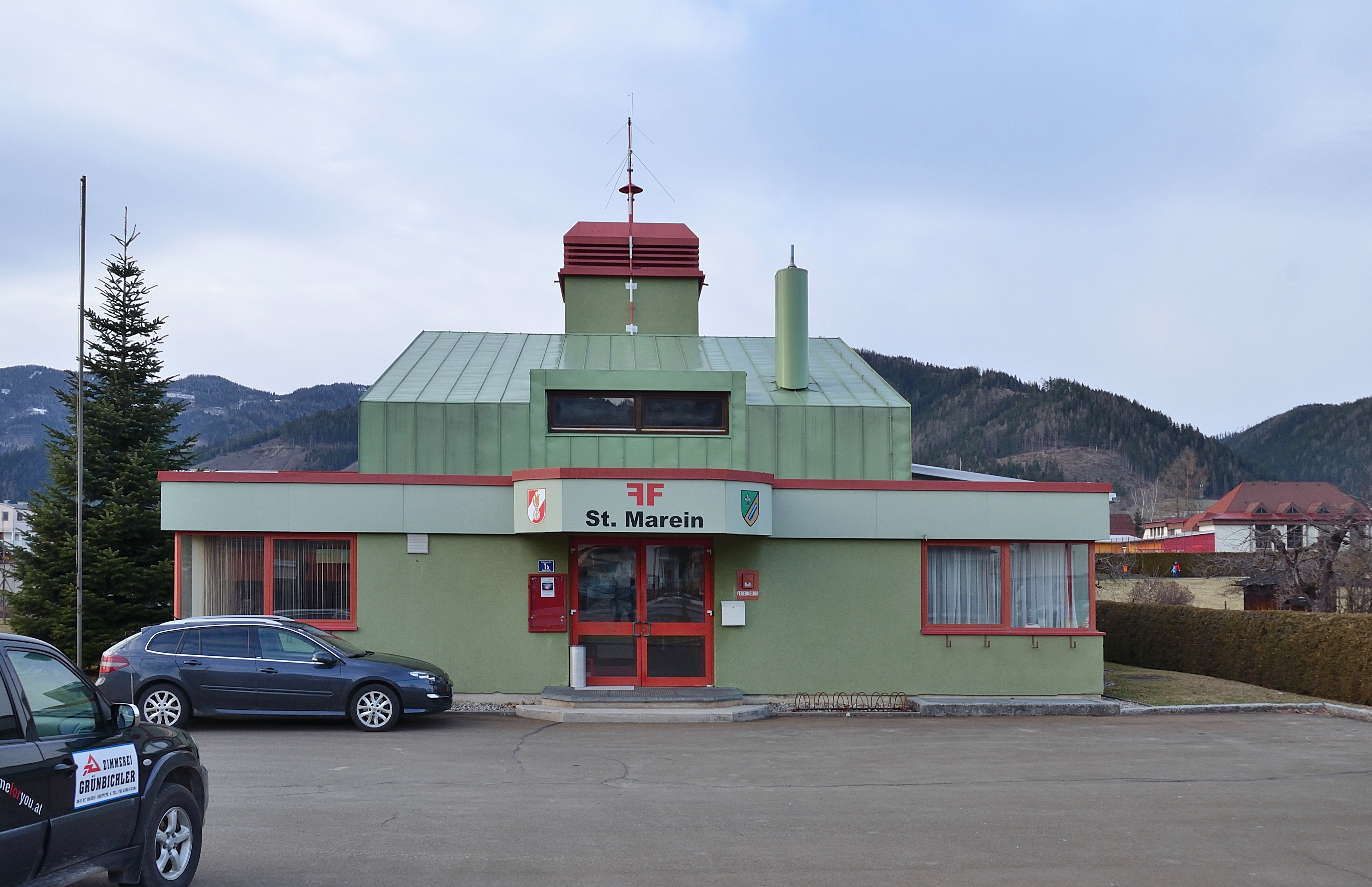 Die Feuerwehrstation der FF St. Marein im Mürztal.